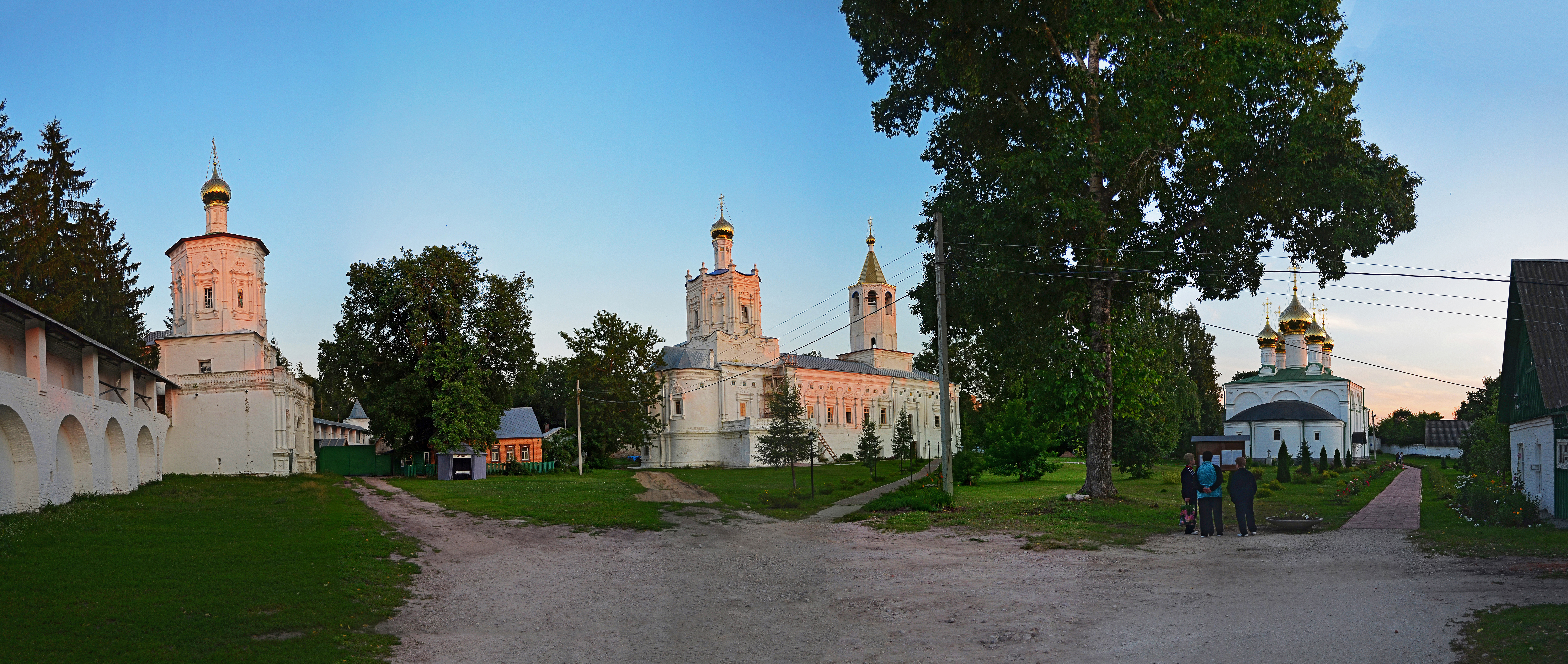 Рязань.Солотчинский Рождества Богородицы женский м-рь(1390).Слева направо:Надвратная церковь св.Иоанна Предтечи,церковь св.Духа и собор Рождества Богородицы.